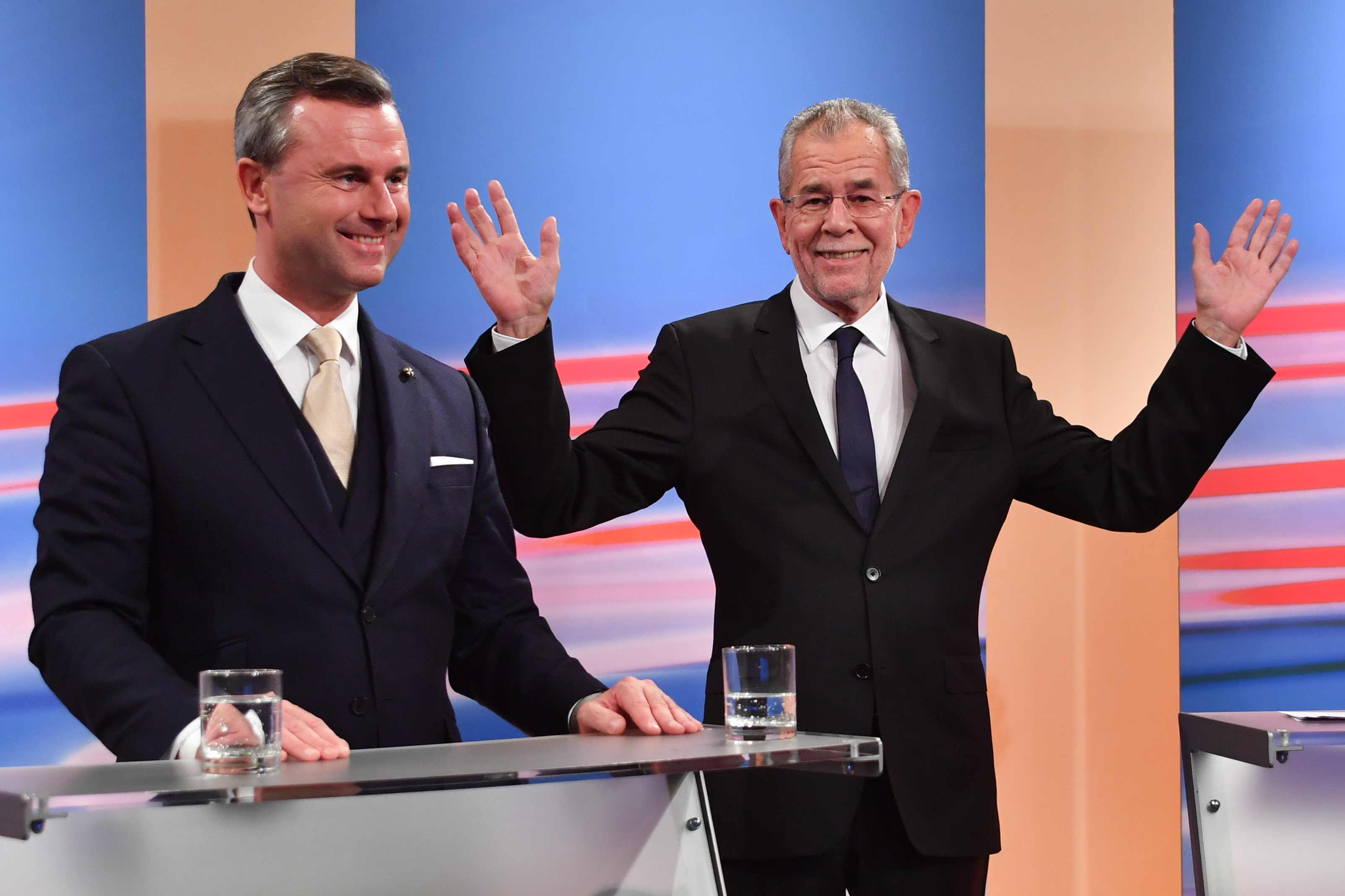 Wahl zum österreichischen Bundespräsidenten am 4. Dezember 2016. Bild zeigt Norbert Hofer und Alexander Van der Bellen nach der Wahl im ORF-Studio in der Hofburg.